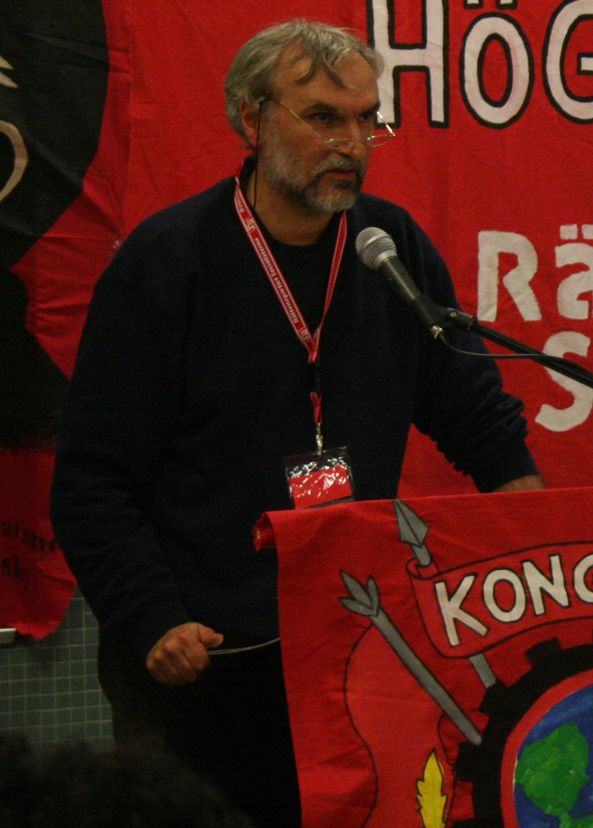 Per-Åke Westerlund. Ordförande för Rättvisepartiet Socialisterna (2008)